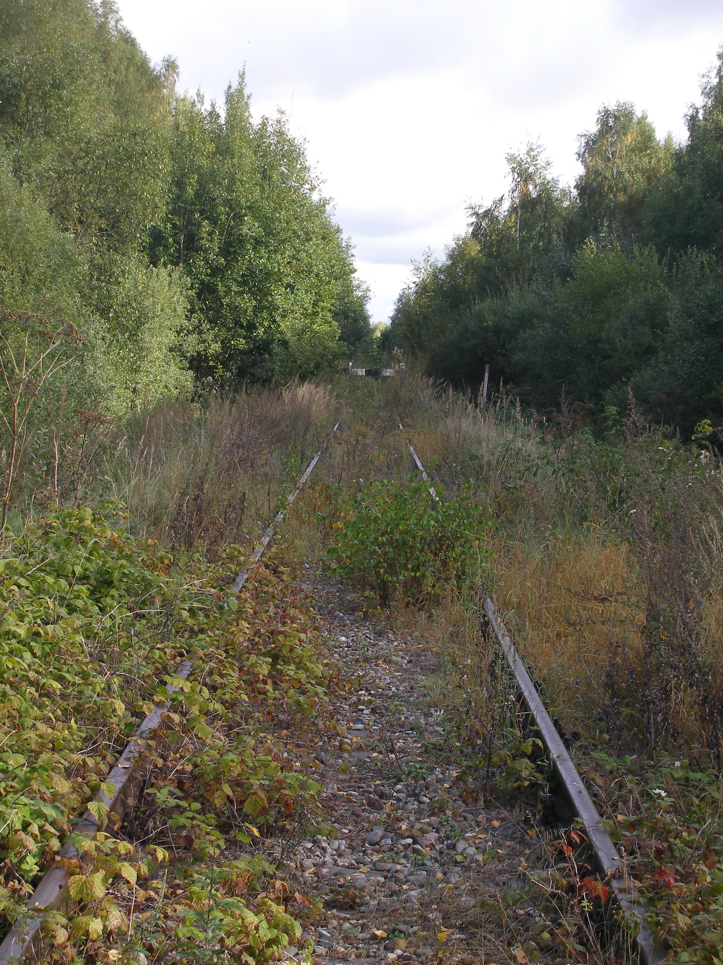 Bijušās dzelzceļa līnijas Rīga˜—Rūjiena beigas aiz Skultes stacijas.